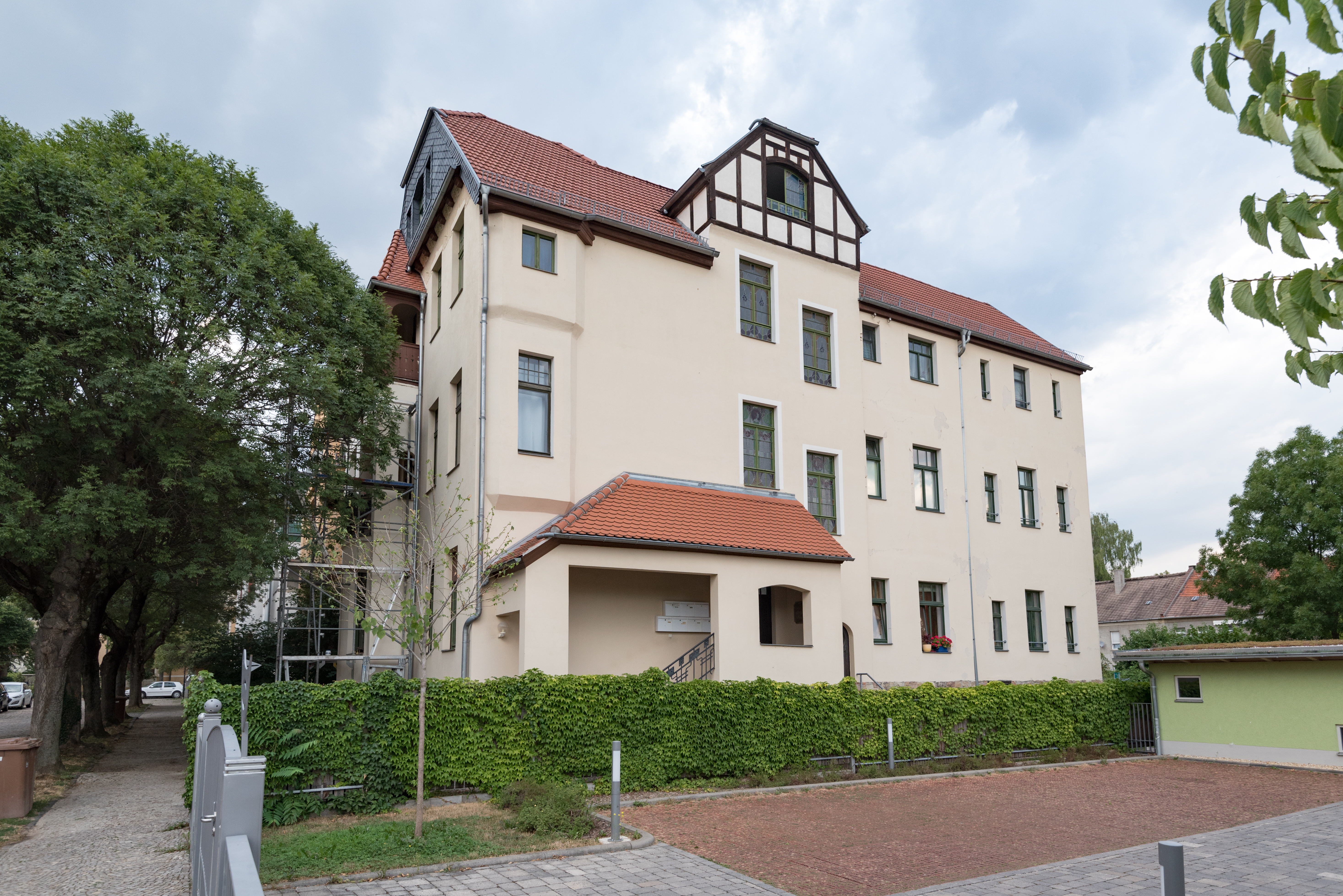 Naumburg (Saale), Theodor-Körner-Straße 10